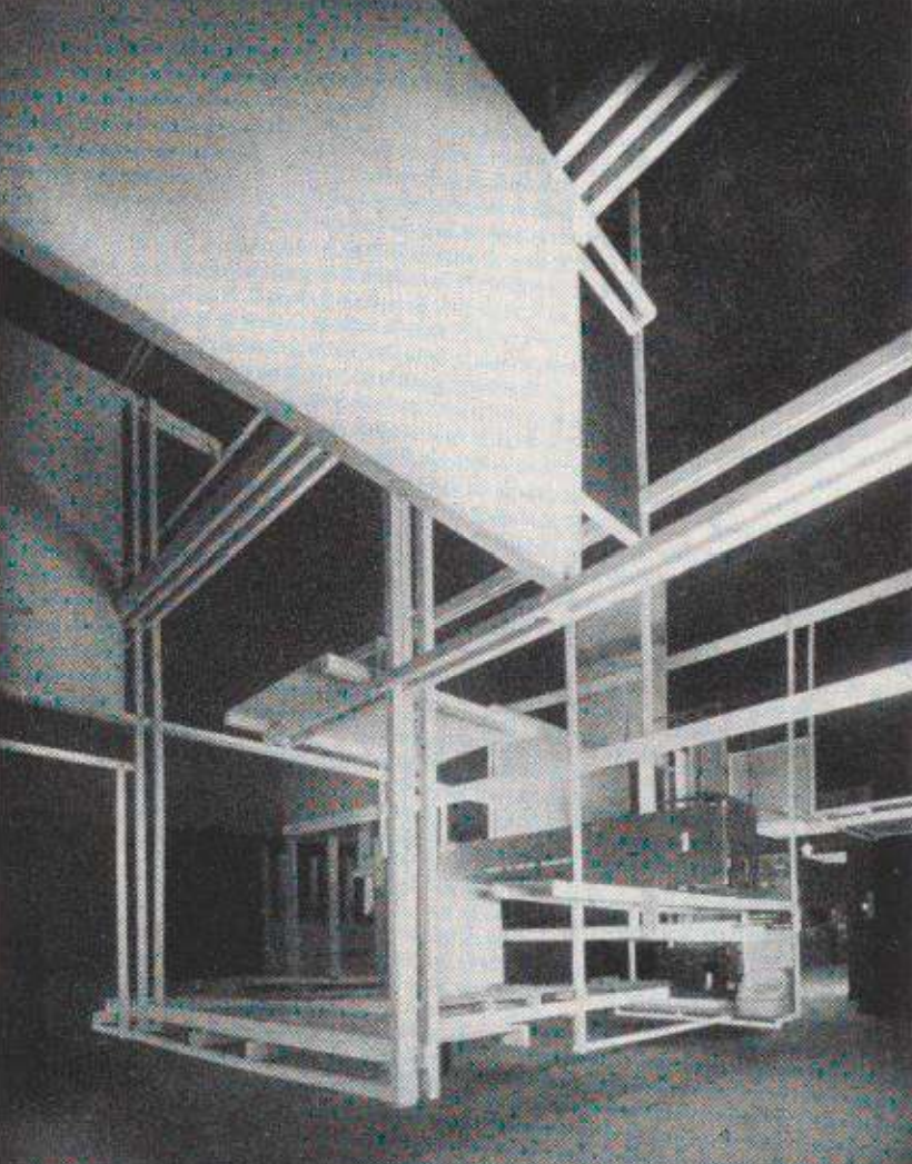 Frederic Kiesler, The city in space, Exposition internationale, Paris, 1925 (image du domaine public modifiée)